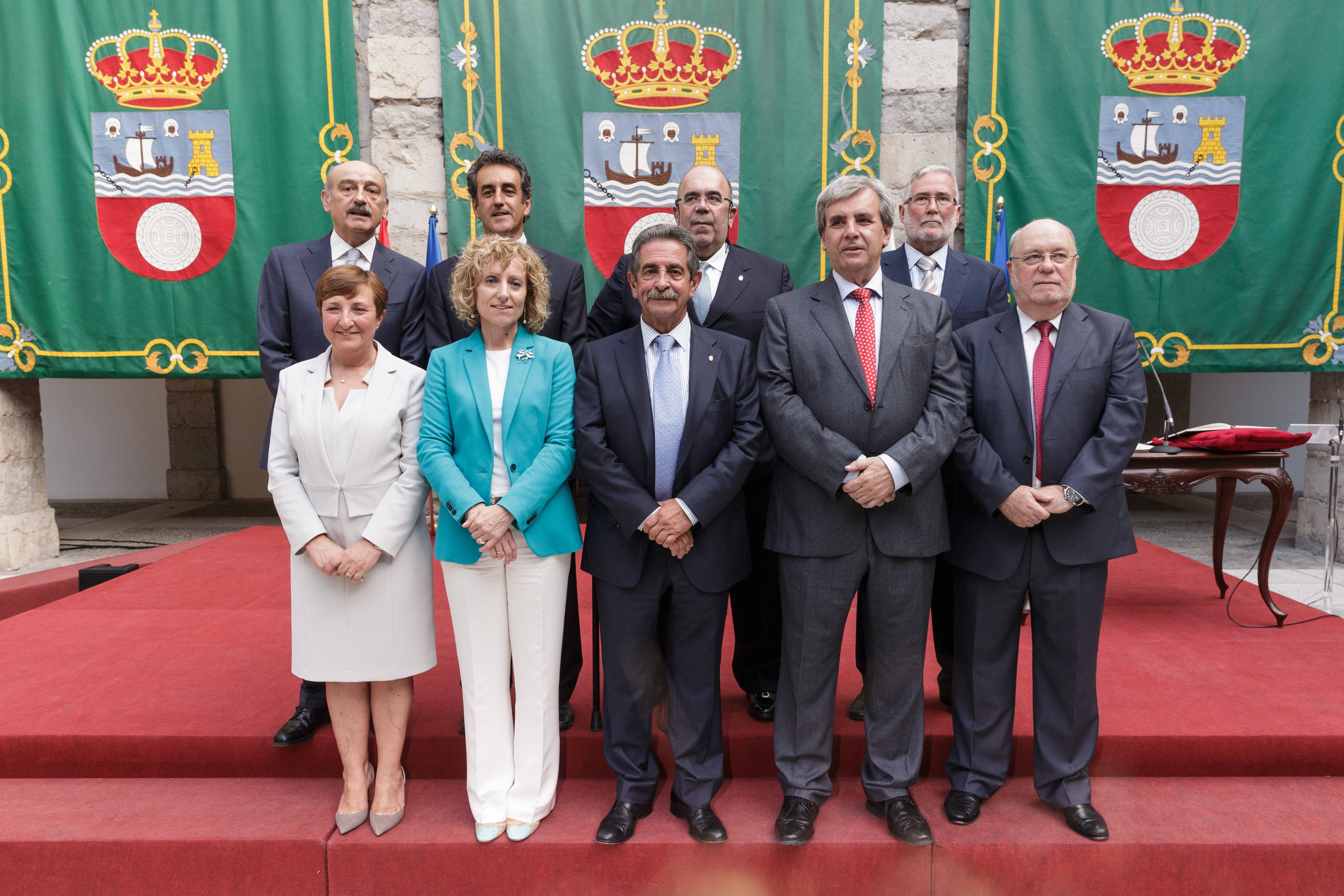 Gobierno inicial de Miguel Ángel Revilla para la IX legislatura.